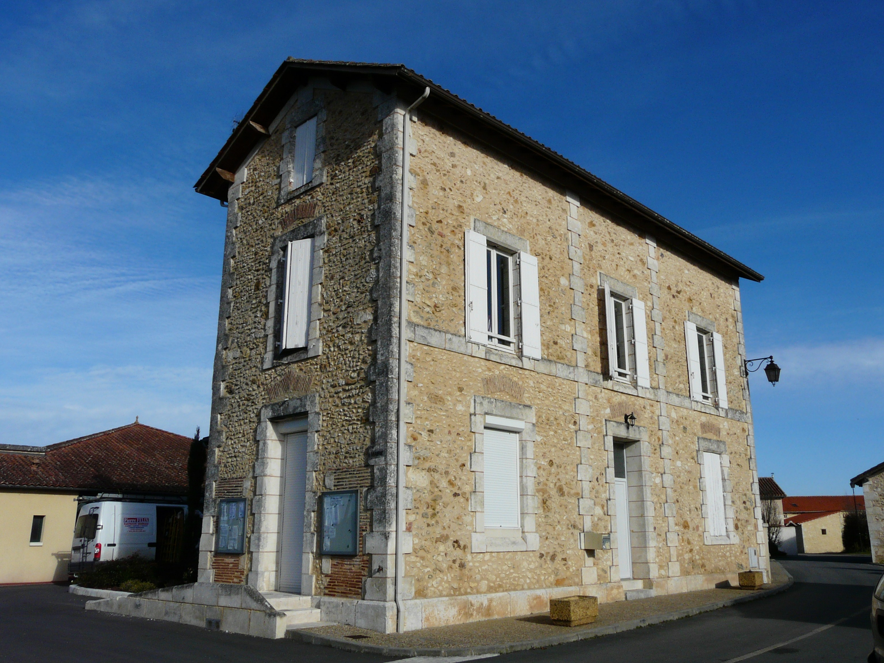 La mairie de Saint-Séverin-d'Estissac, Dordogne, France.